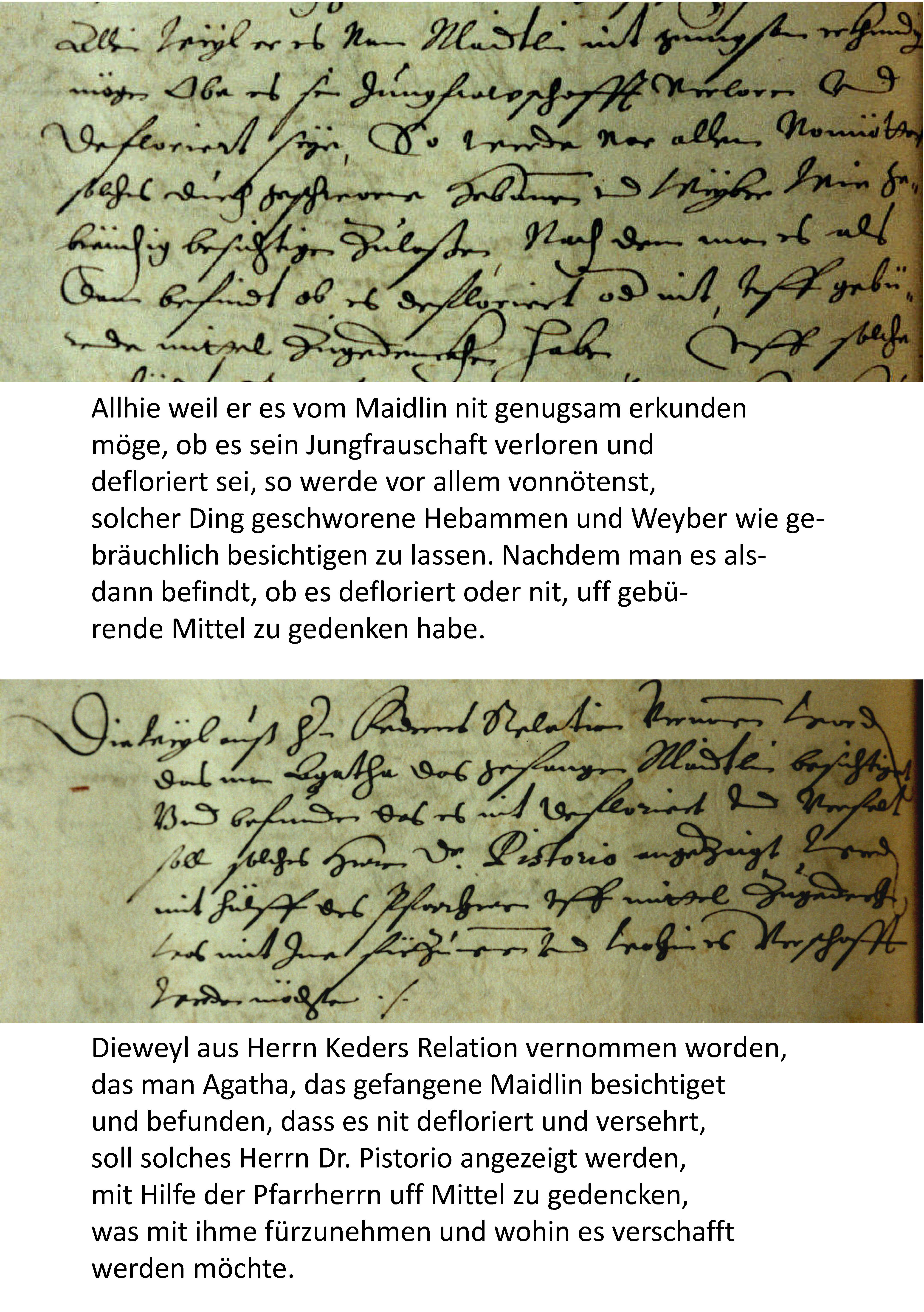 2 Ausschnitte aus Hexenprozeß-Protokollen im Stadtarchiv Freiburg im Breisgau, 1603, von Hans-Jürgen Günther, mit Transkription. Die Frau wurde gerettet von Johannes Pistorius d.J. Unknown